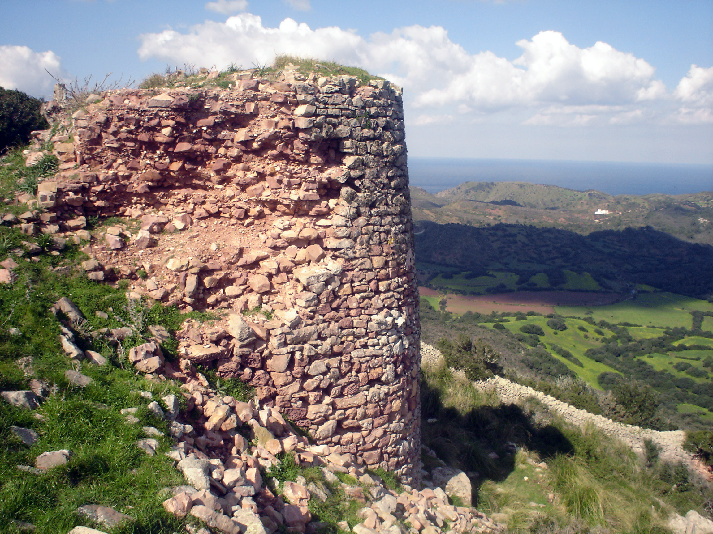 Author: Francisco Valverde Taken at Santa Àgueda (Minorca)